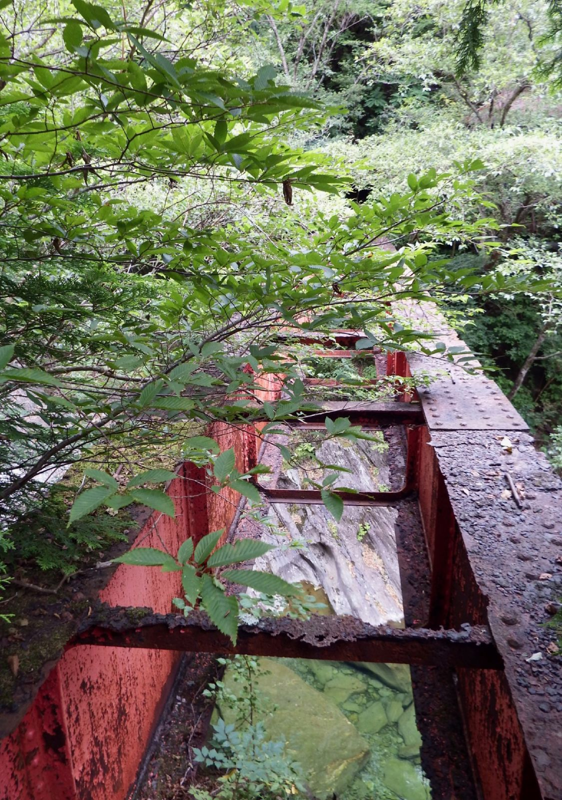 旧別子の日浦通洞